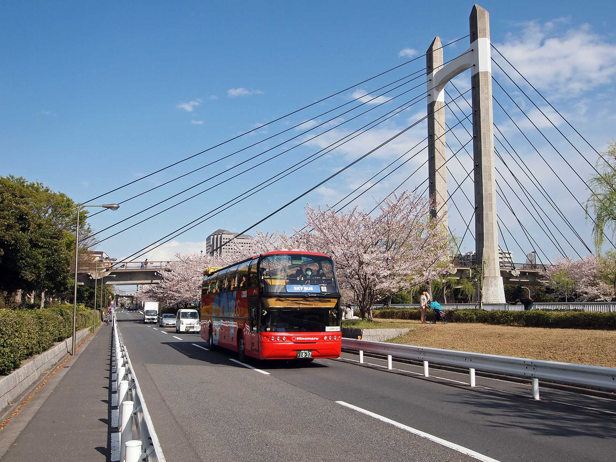 東京都江東区の「お江戸深川桜祭り」で特別運行された日の丸自動車興業のオープントップバス「スカイバス東京」。門前仲町駅付近の黒船橋を起点に中央区・江東区の桜の名所を巡る。 登録番号：練馬200か1837 撮影地：東京都江東区、木場公園